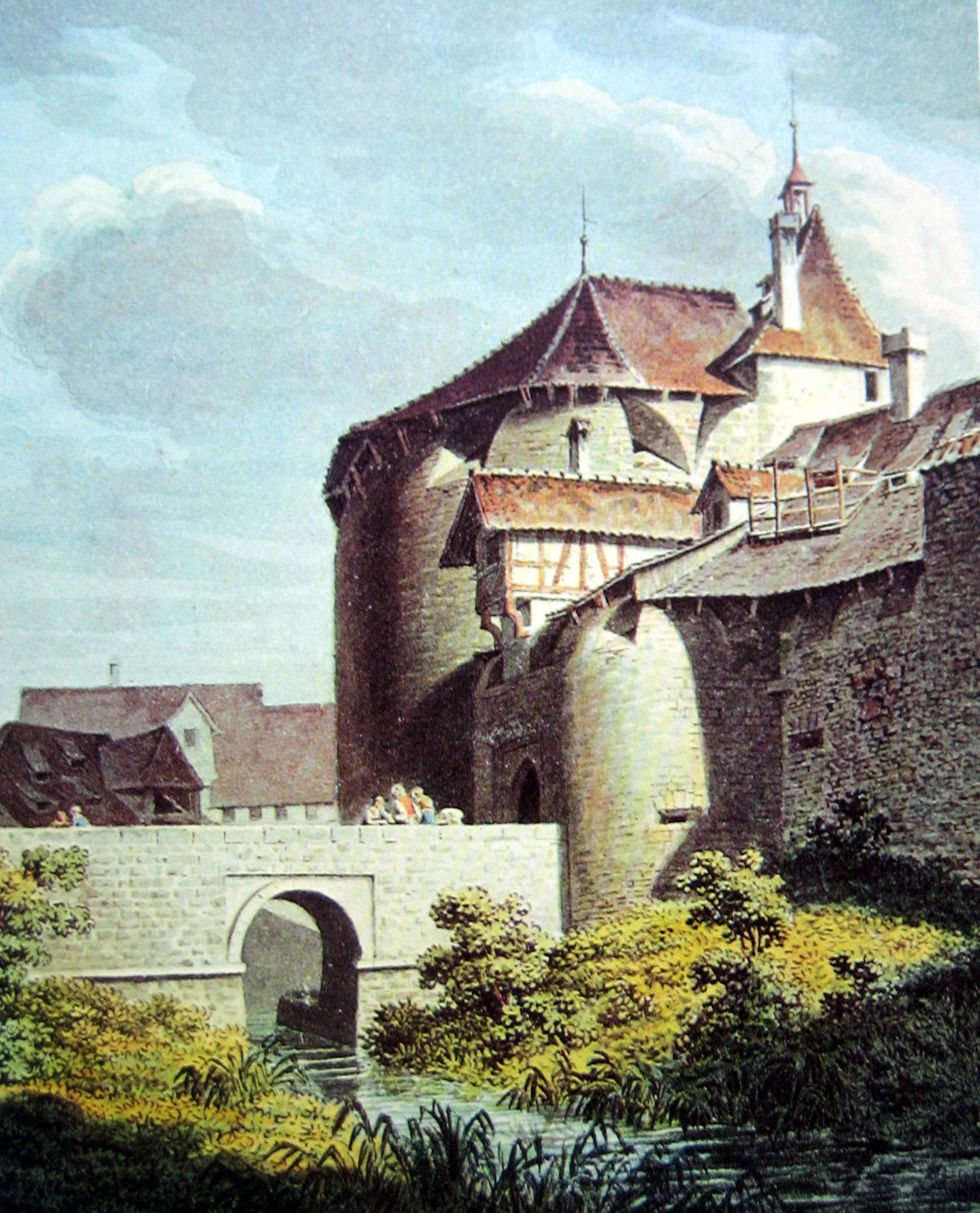 Rennwegbollwerk und Fröschengraben in Zürich 1812, Aquarell von Franz Hegi (†1850), Kunsthaus Zürich